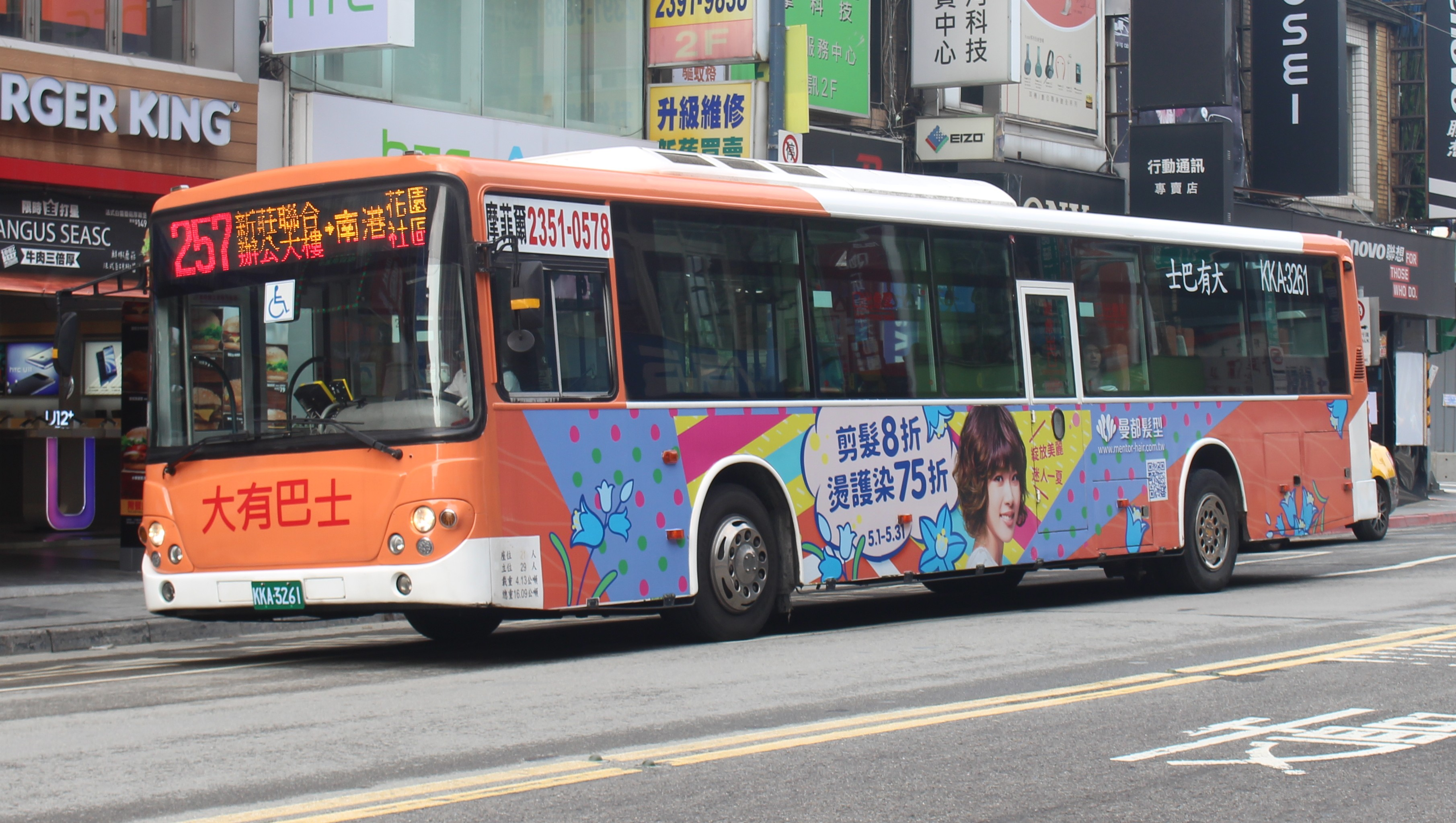 大有巴士 KKA-3261 257